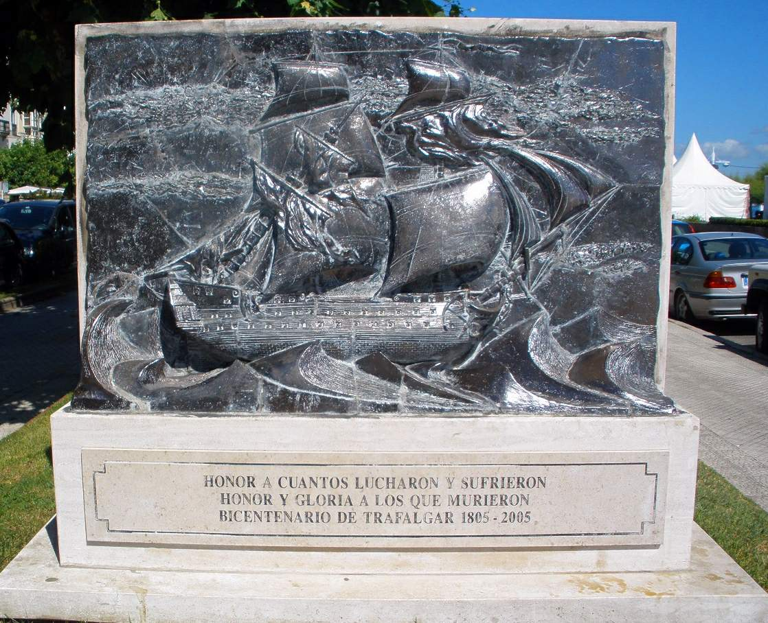 Santander - Paseo de Pereda, memorial de los caídos en la batalla de Trafalgar